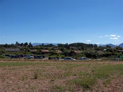 Montfleury vu de l'extérieure